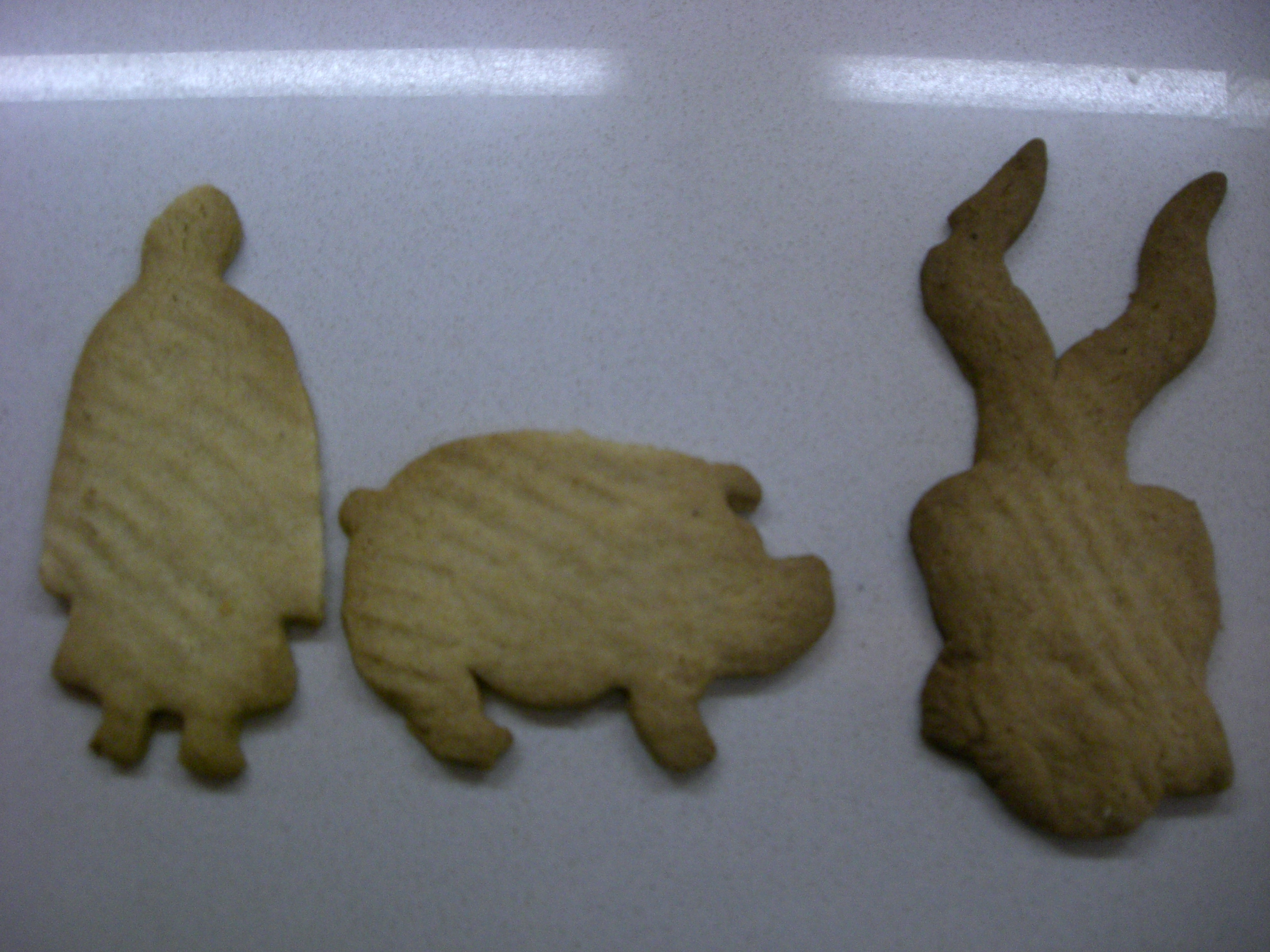 Senyorets fets segons la tradició manacorina amb motius de Sant Antoni.